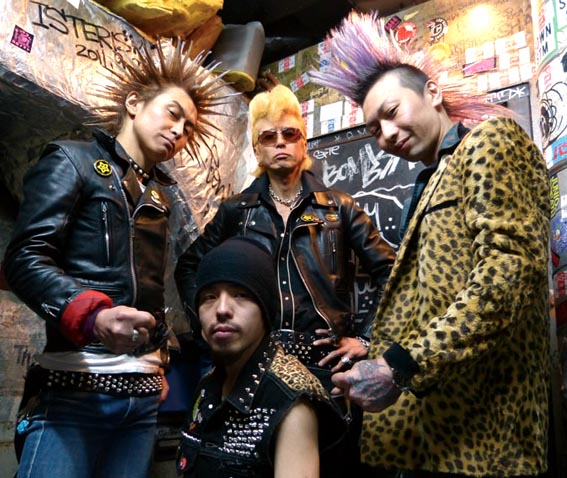 ゲンドウミサイル 2012/04